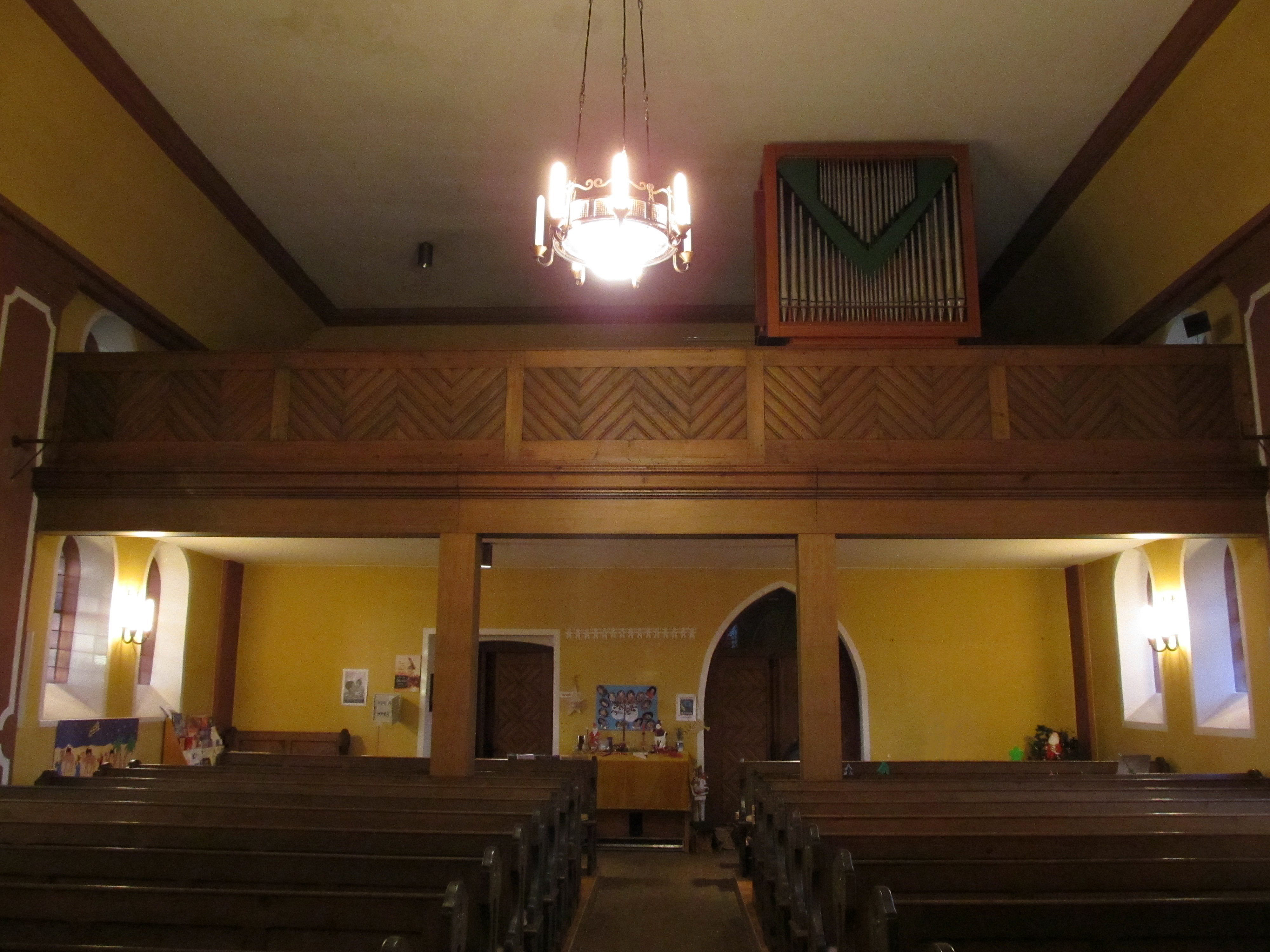 Blick ins Innere der protestantischen Kirche in Brenschelbach, Saarland